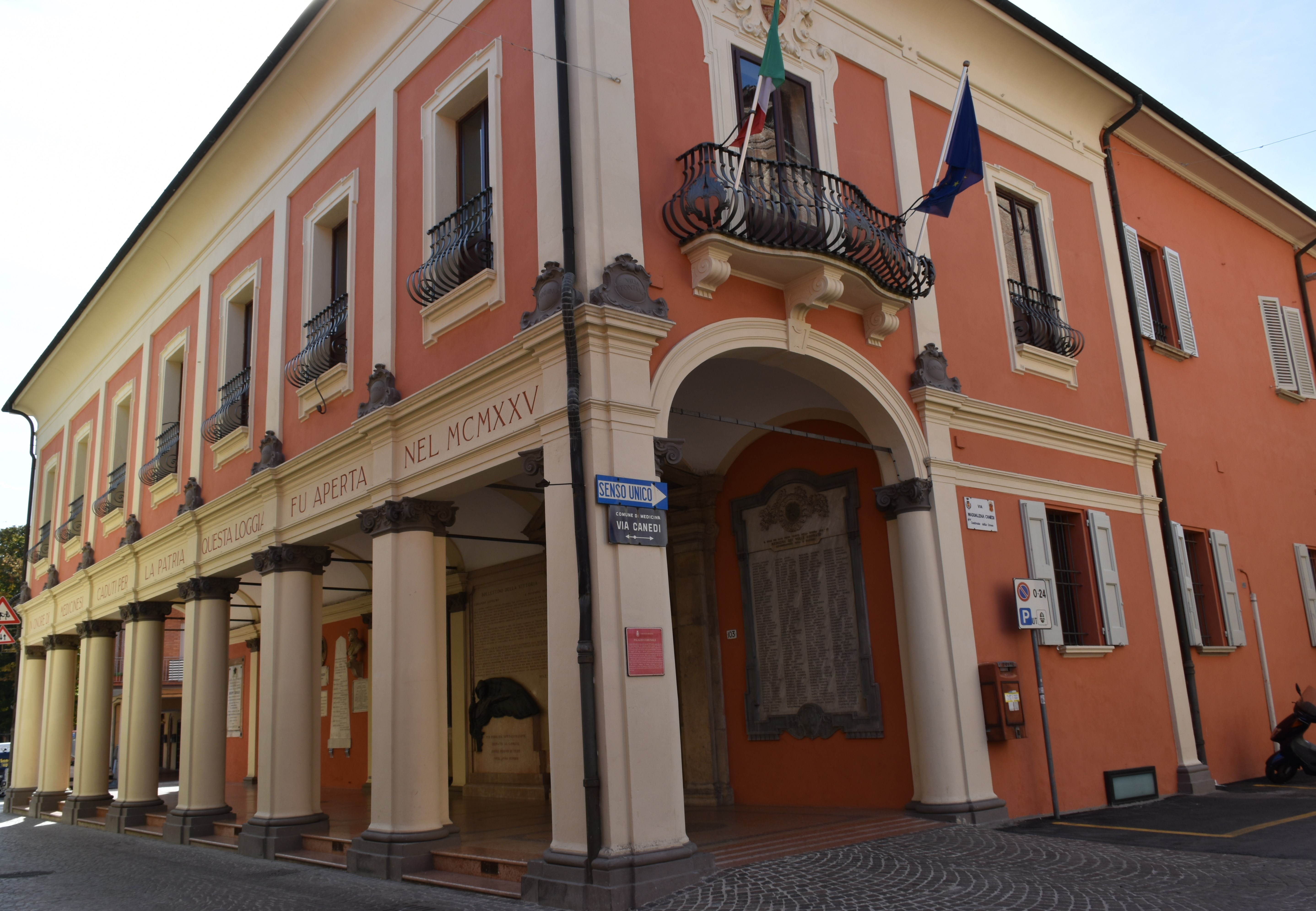 Palazzo comunale This is a photo of a monument which is part of cultural heritage of Italy.